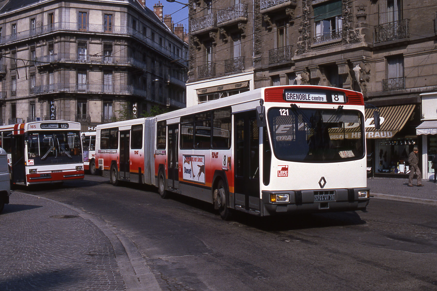 Un Renault PR100.R rue Félix-Poulat à Grenoble en 1985. Il se distingue des PR100.2 par les portes qui ne sont pas vitrée jusqu'en bas.